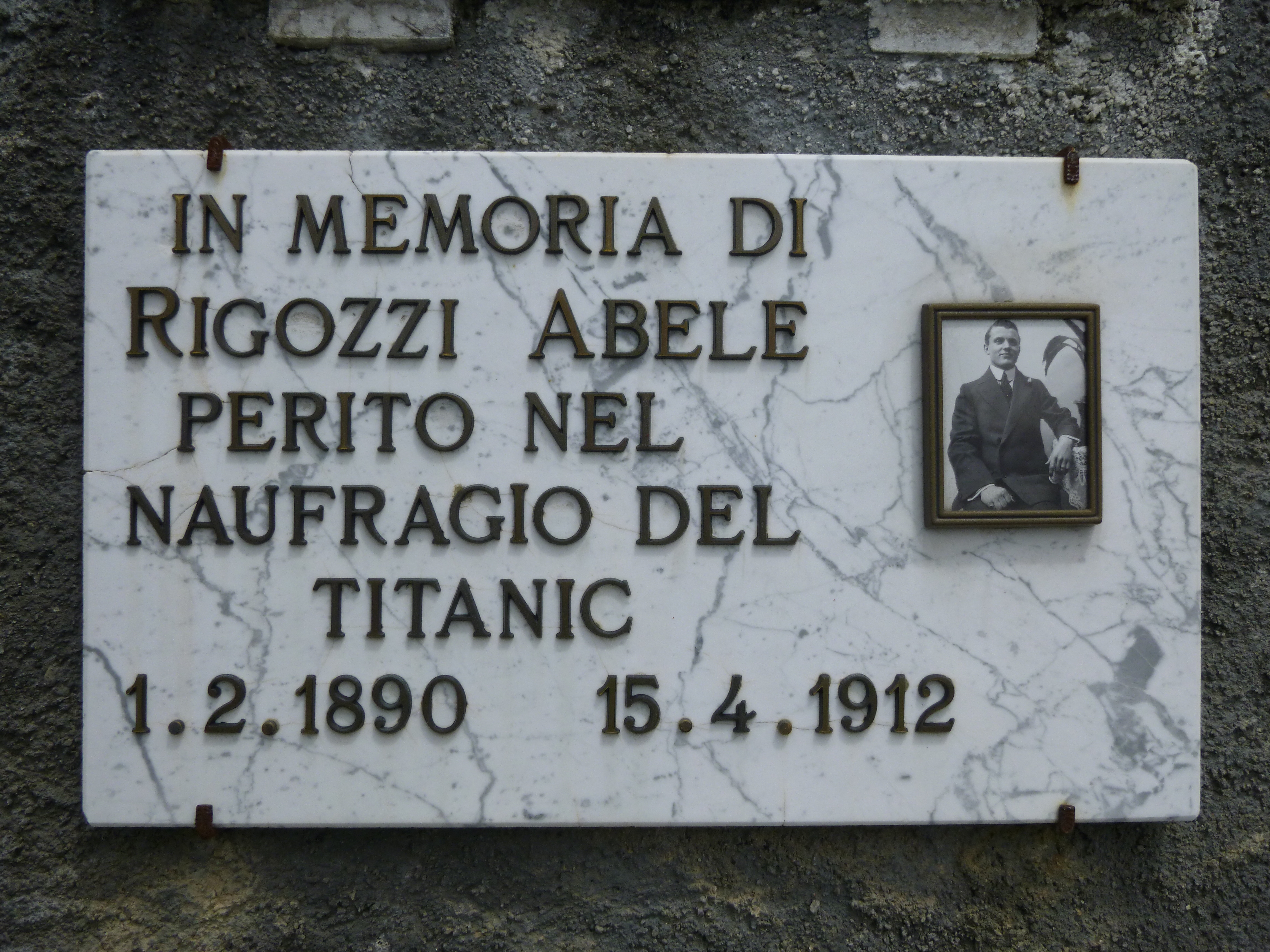 Gedenktafel für Abele Rigozzi, ein Ofer der Titanic aus Aquila TI.